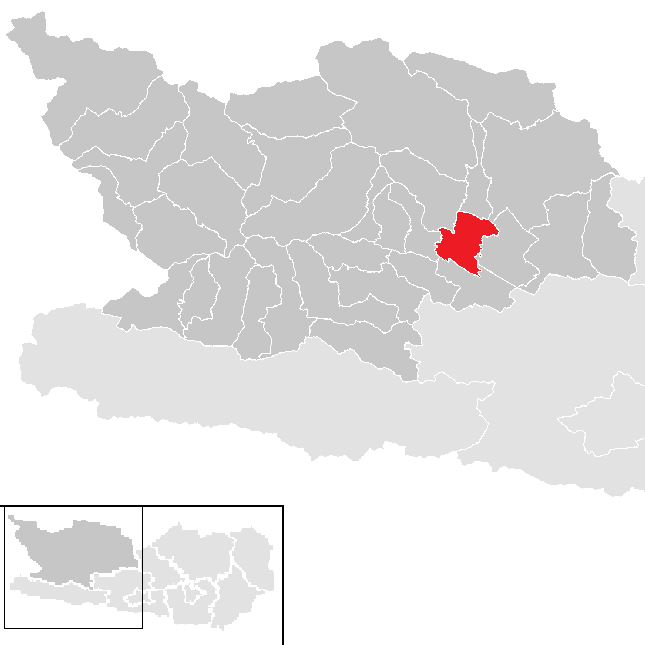 Bezirk Spittal an der Drau